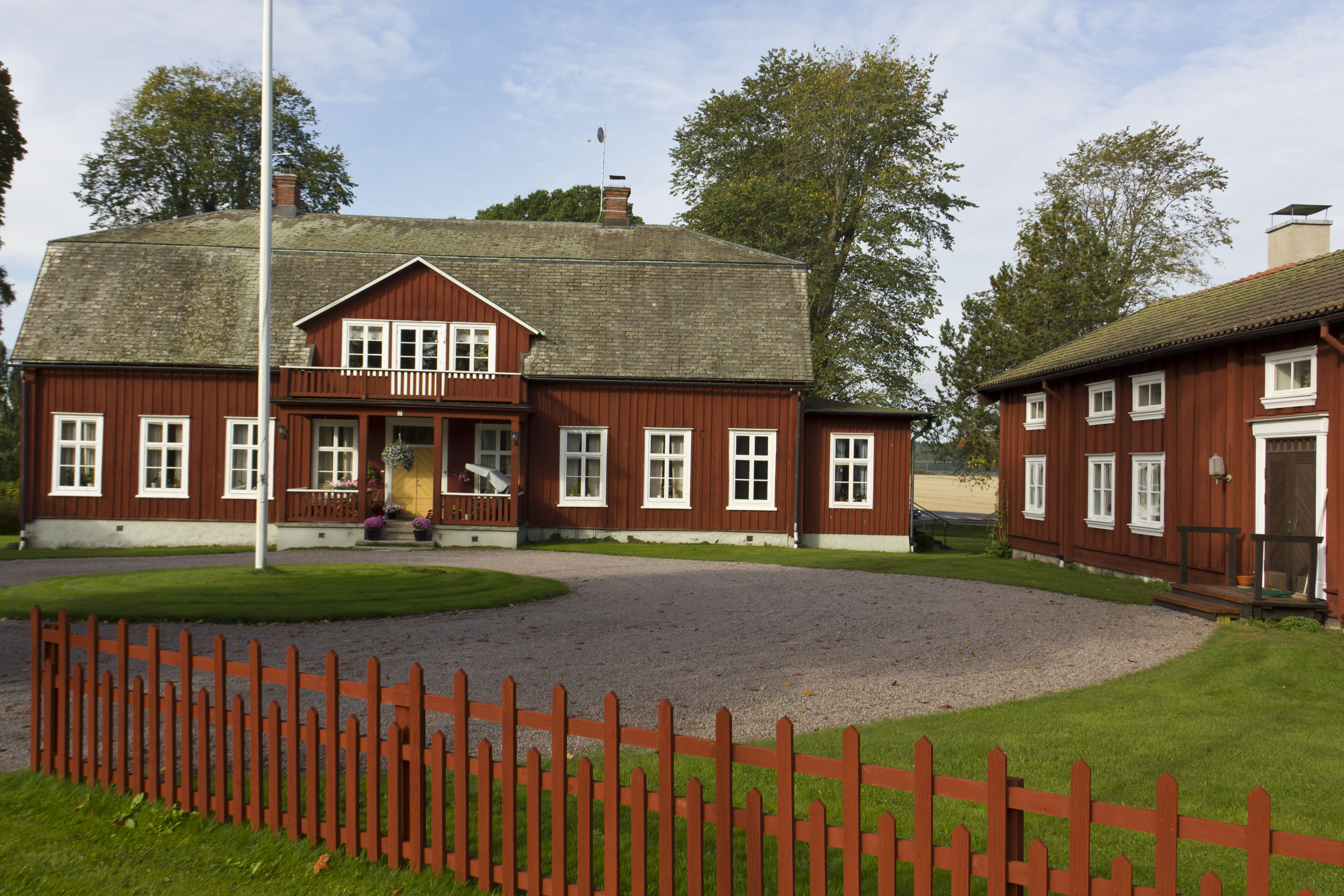 Hova prästgård (Hova Prästbol 3:2)